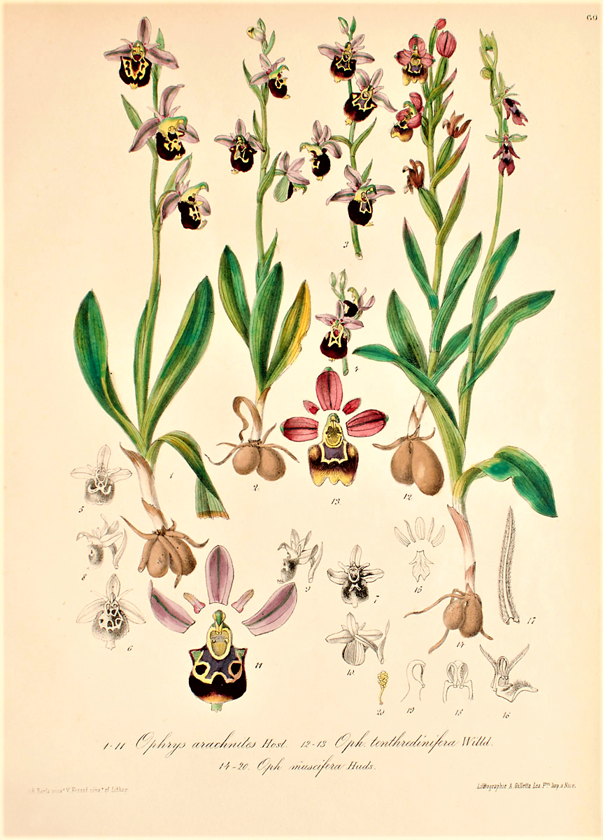 Ophrys aranchites Scop. (1772), heute Ophrys holoserica (Burm.f.) Greuter, 1967